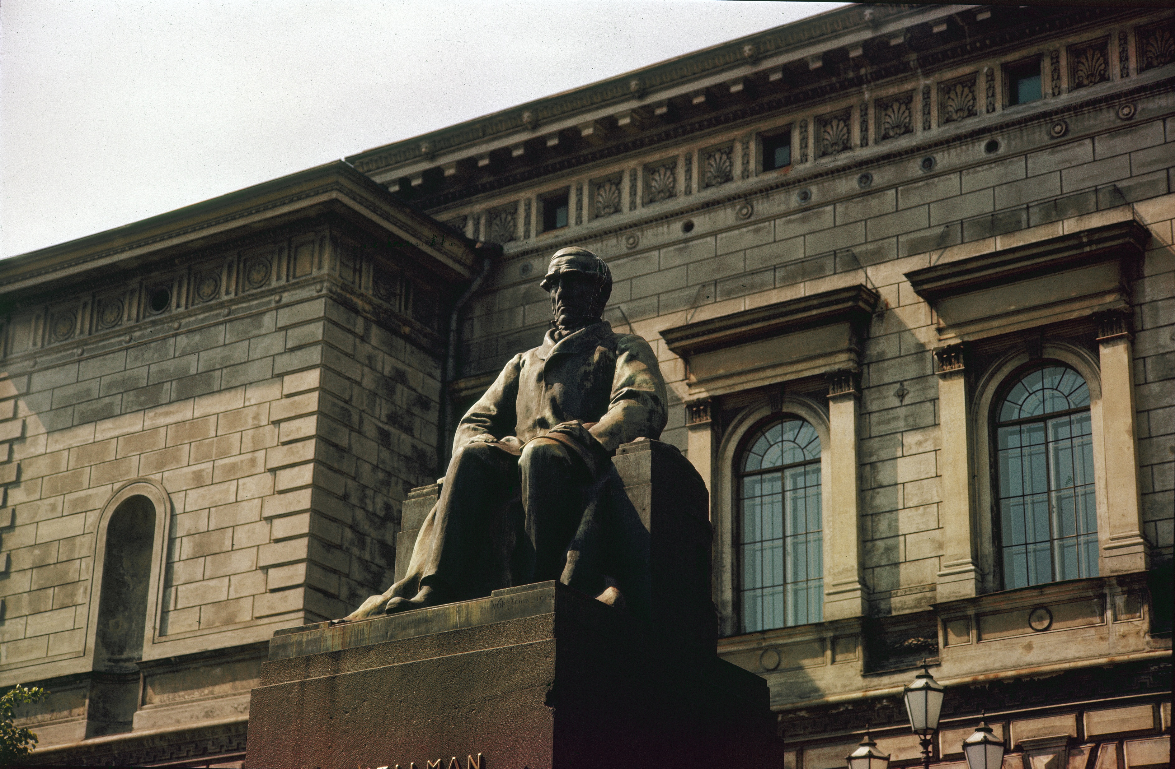 J. V. Snellmanin patsas Suomen Pankin edustalla kuvattuna vuonna 1957.